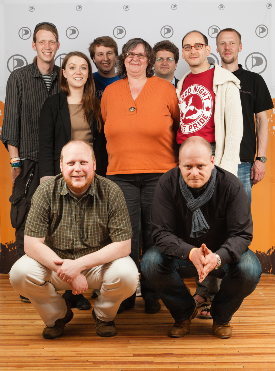 Der Vorstand der Piratenpartei Deutschland 2012; Stehend v. l. n. r.: Markus Barenhoff, Julia Schramm, Matthias Schrade, Swanhild Goetze, Sebastian Nerz, Johannes Ponader, Sven Schomacker. Hockend, v. l. n. r.: Klaus Peukert, Bernd Schlömer